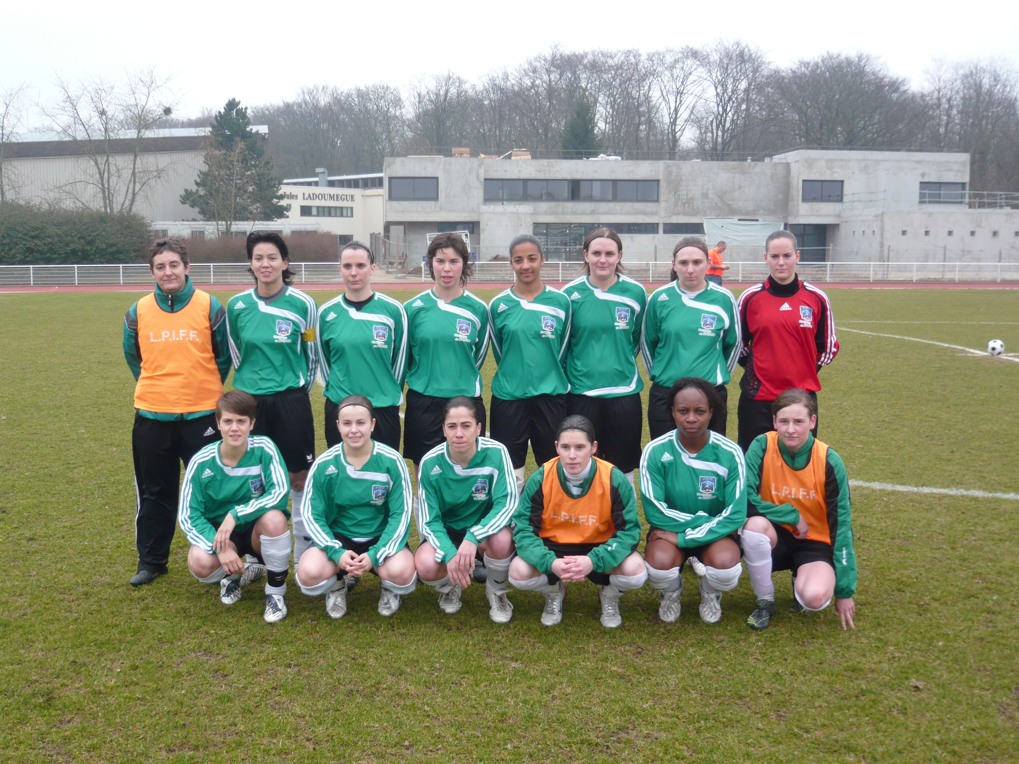 L'équipe féminine de l'AS Montigny-le-Bretonneux le 22 février 2009 avant le seizième de finale du Challenge de France face à Hénin-Beaumont.